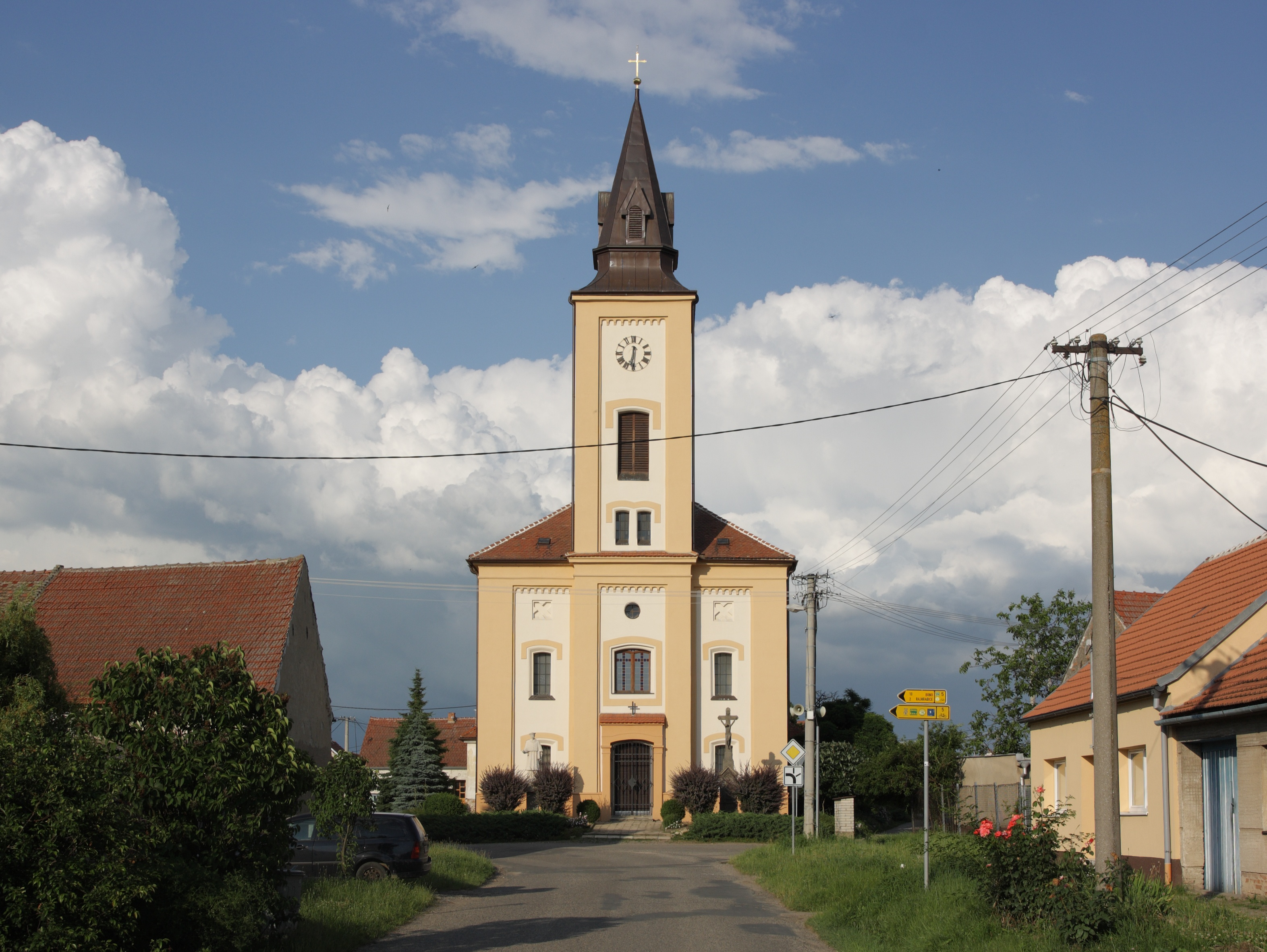 Opatovice - kostel sv Karla Boromejského - jižní pohled.